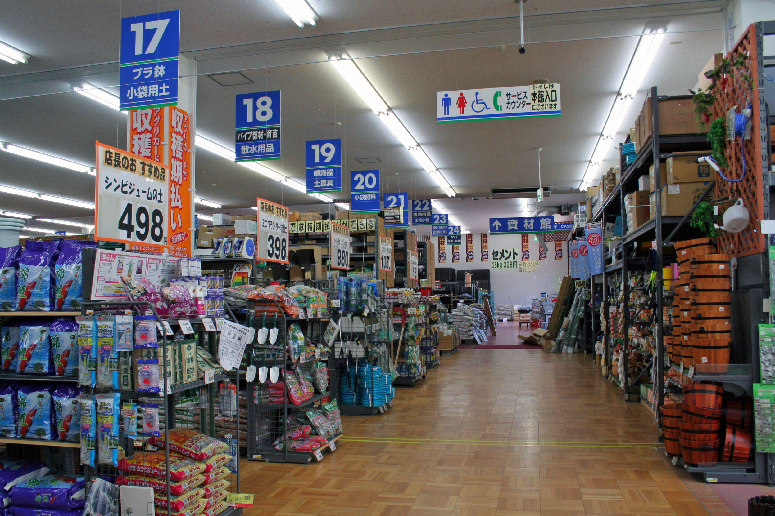 兵庫県南西部にある店舗など。撮影地（姫路・佐用）。 ホームセンターの店内。